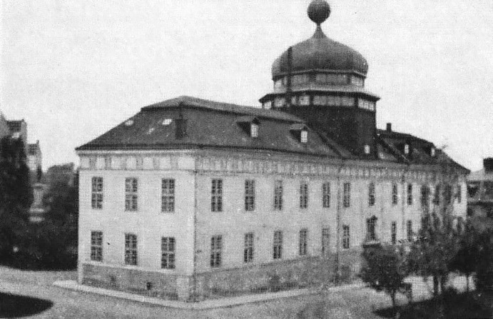 Gustavianum, från Ugglan.